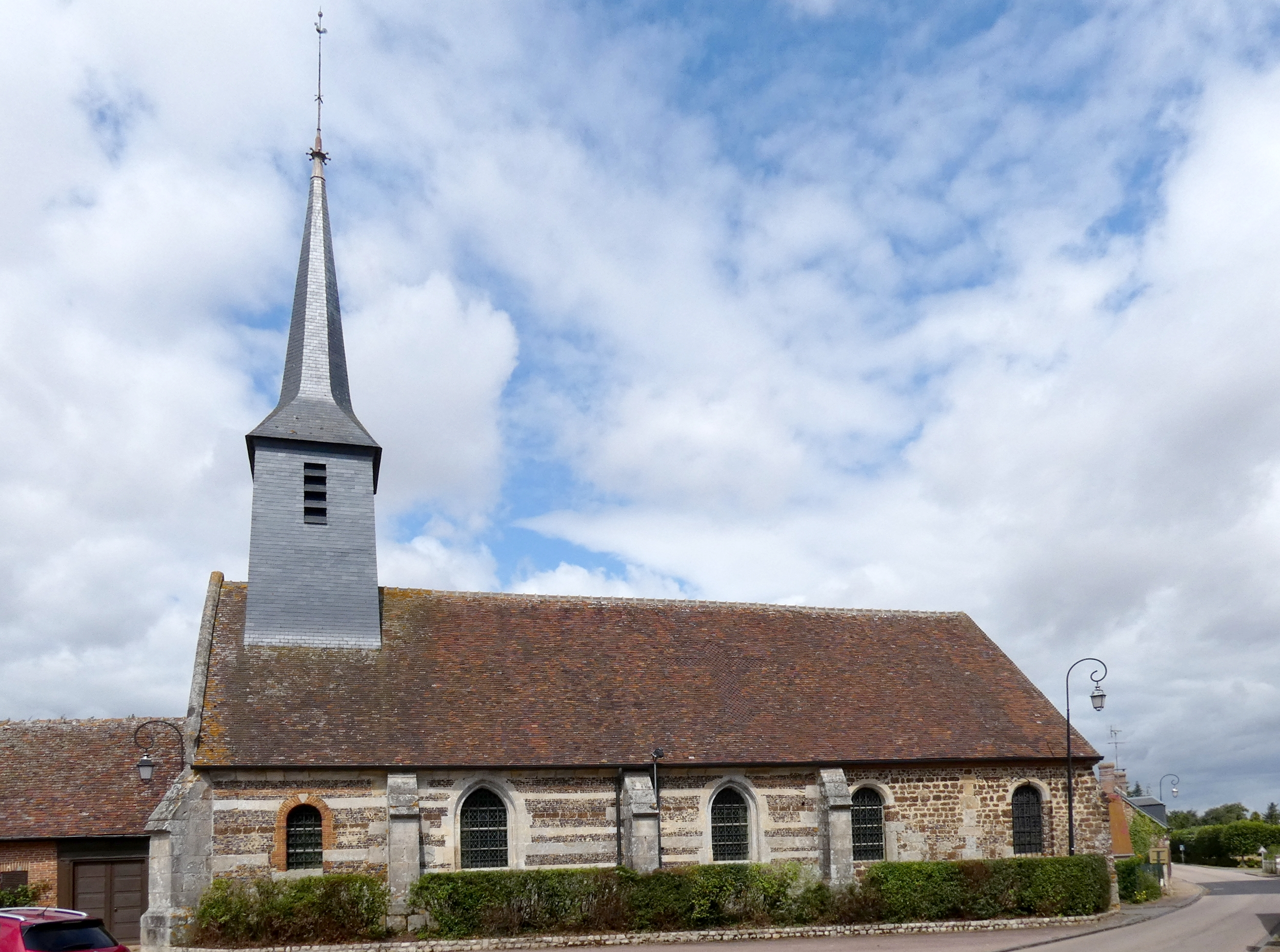 Chambord (Normandie, France). L'église Saint-Martin.